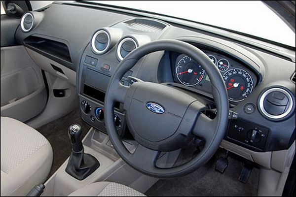 interior do Ikon 2008